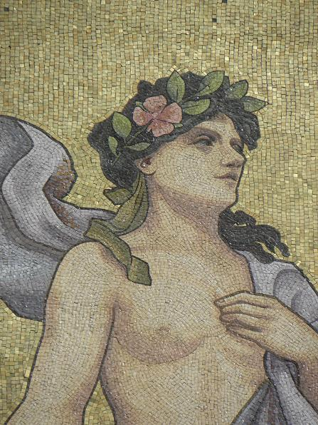 Lyon : Mosaïque de la muse Polymnie de la salle Rameau